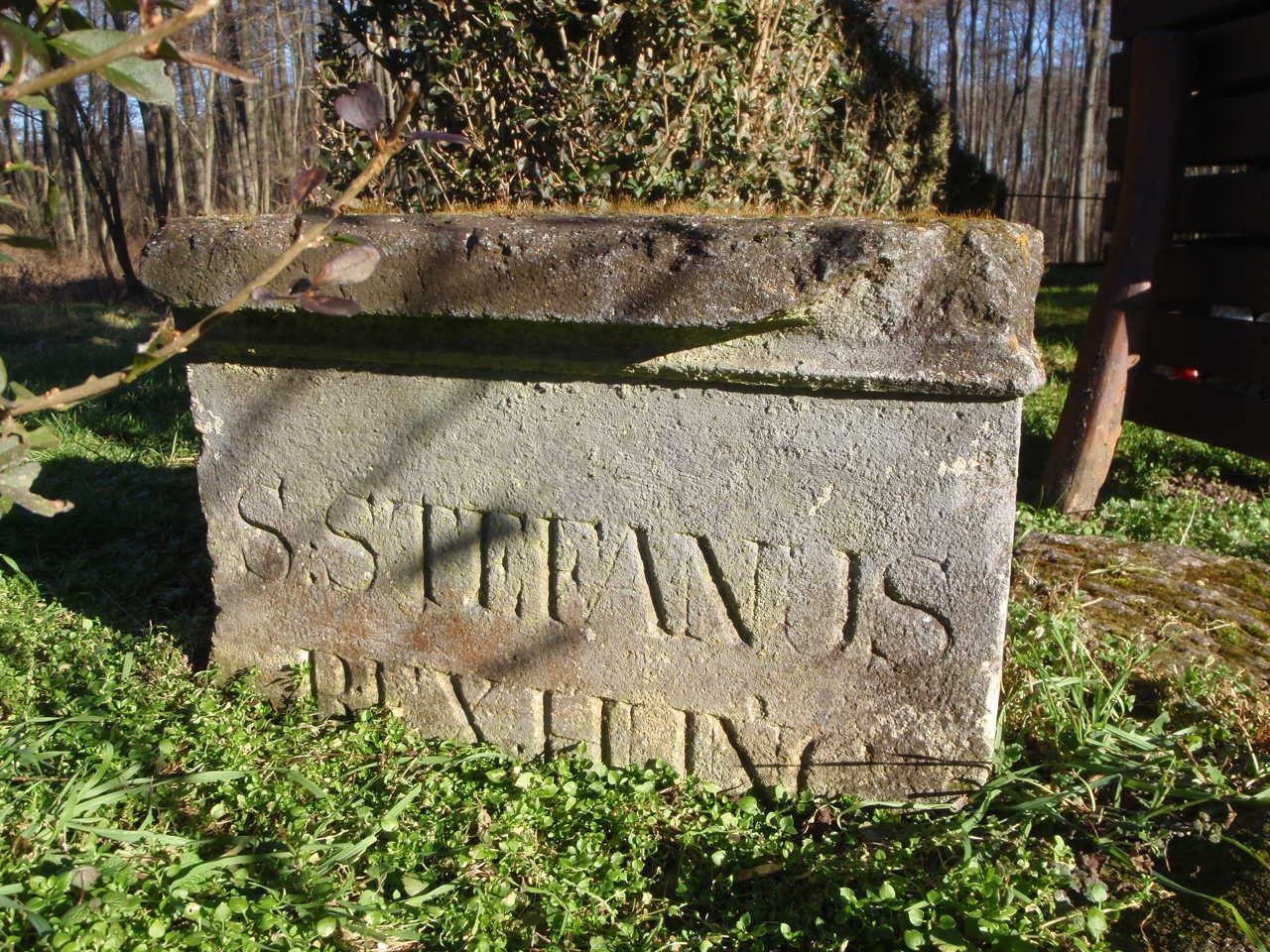 Vát Szentkúti kápolna melletti kőfelirat